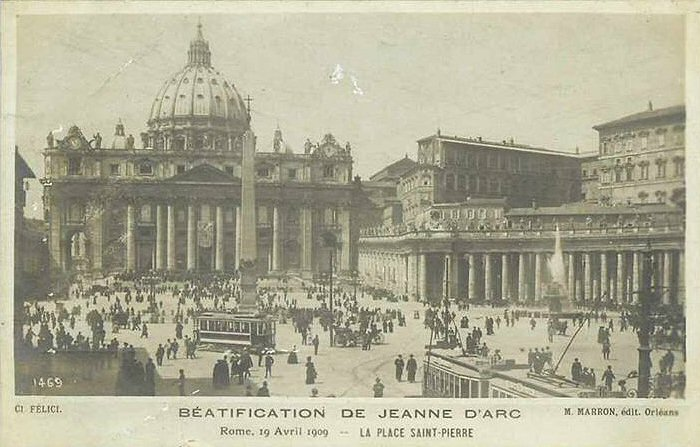 Piazza San Pietro